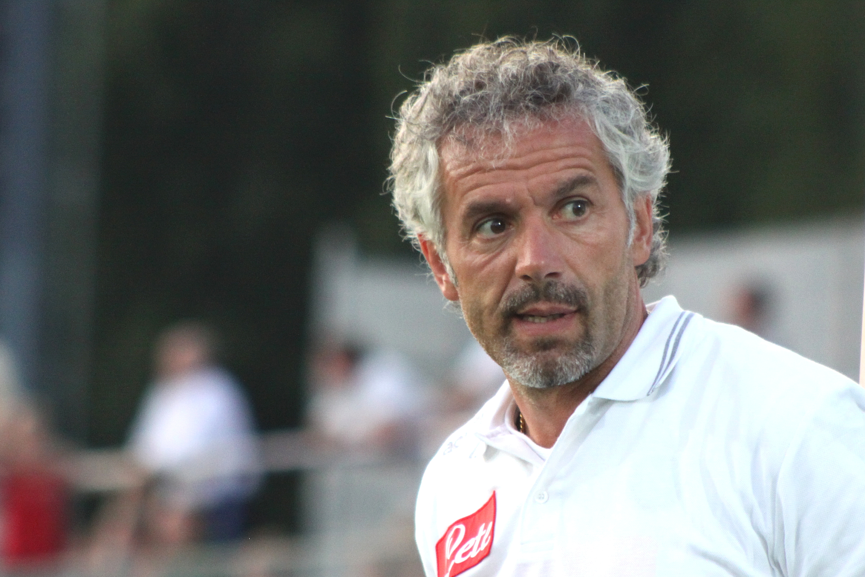 Trainer Roberto Donadoni - SSC Neapel (9) Allentatore Roberto Donadoni - Società Sportiva Calcio Napoli